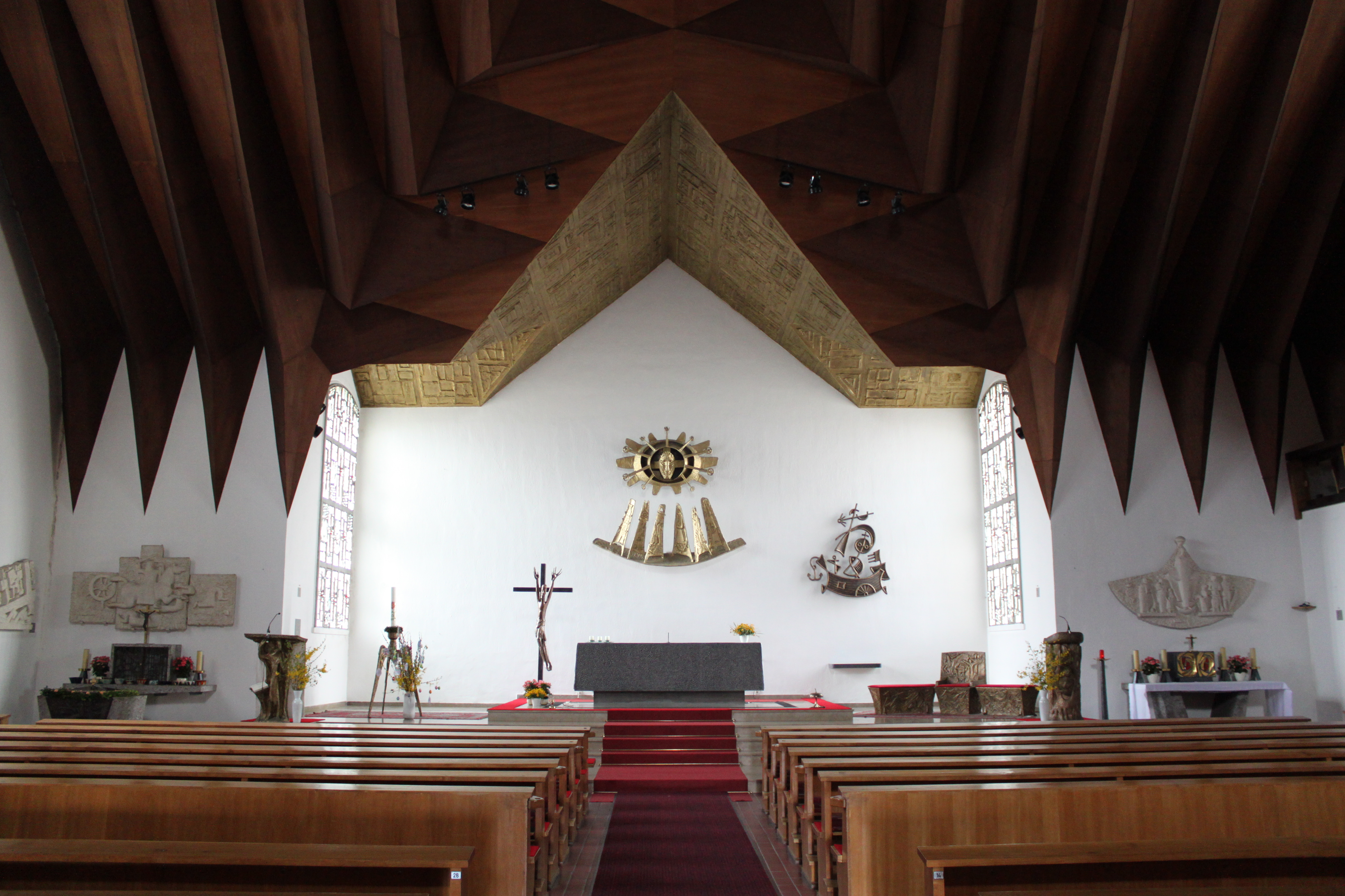 Innenraum der Pfarrkirche St. Georg in Bad Traunstein, Waldviertel, Niederösterreich